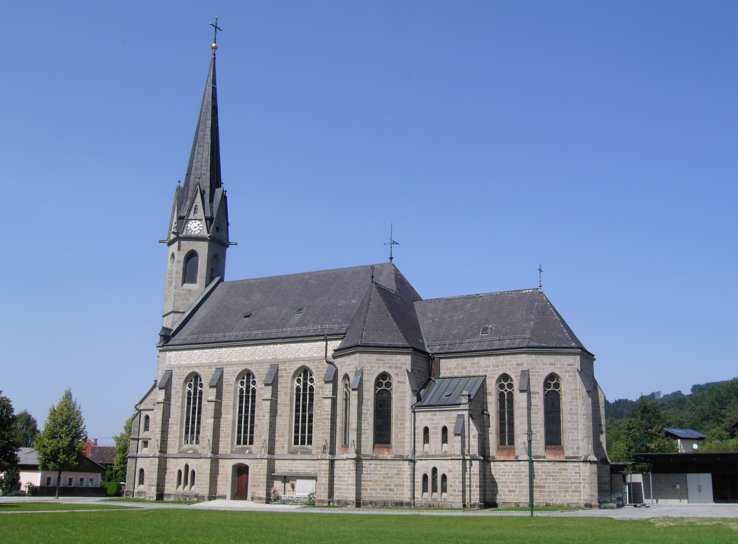 Sankt Ulrich bei Steyr Kath.Filialkirche Kleinraming, Kirchenplatz 8